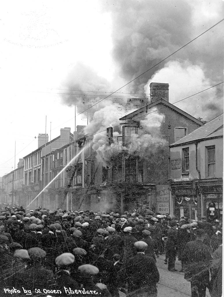 Cardiff Street, Aberdare, Rhondda, Wales